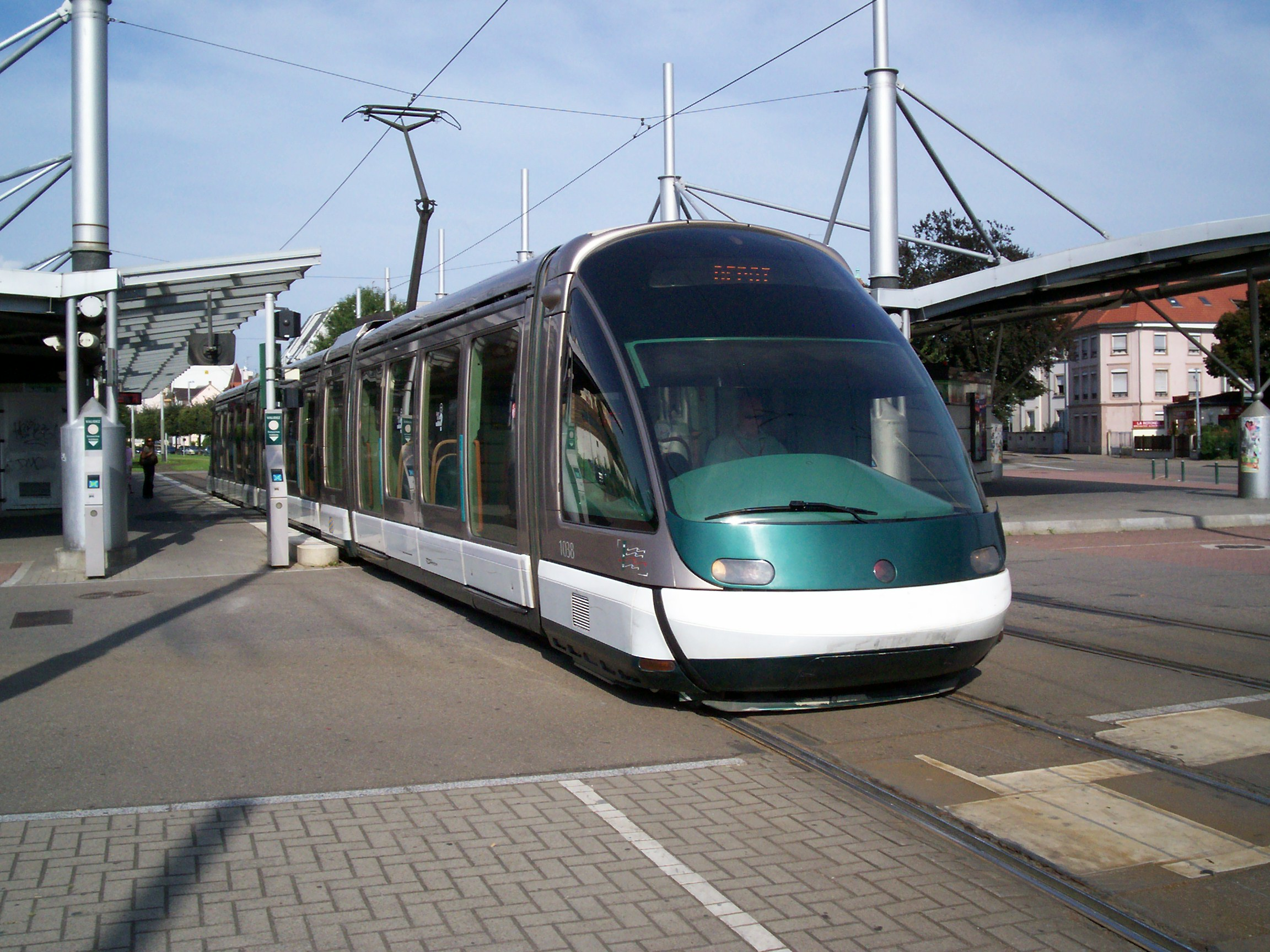 Rame Eurotram en direction du dépôt à Rotonde